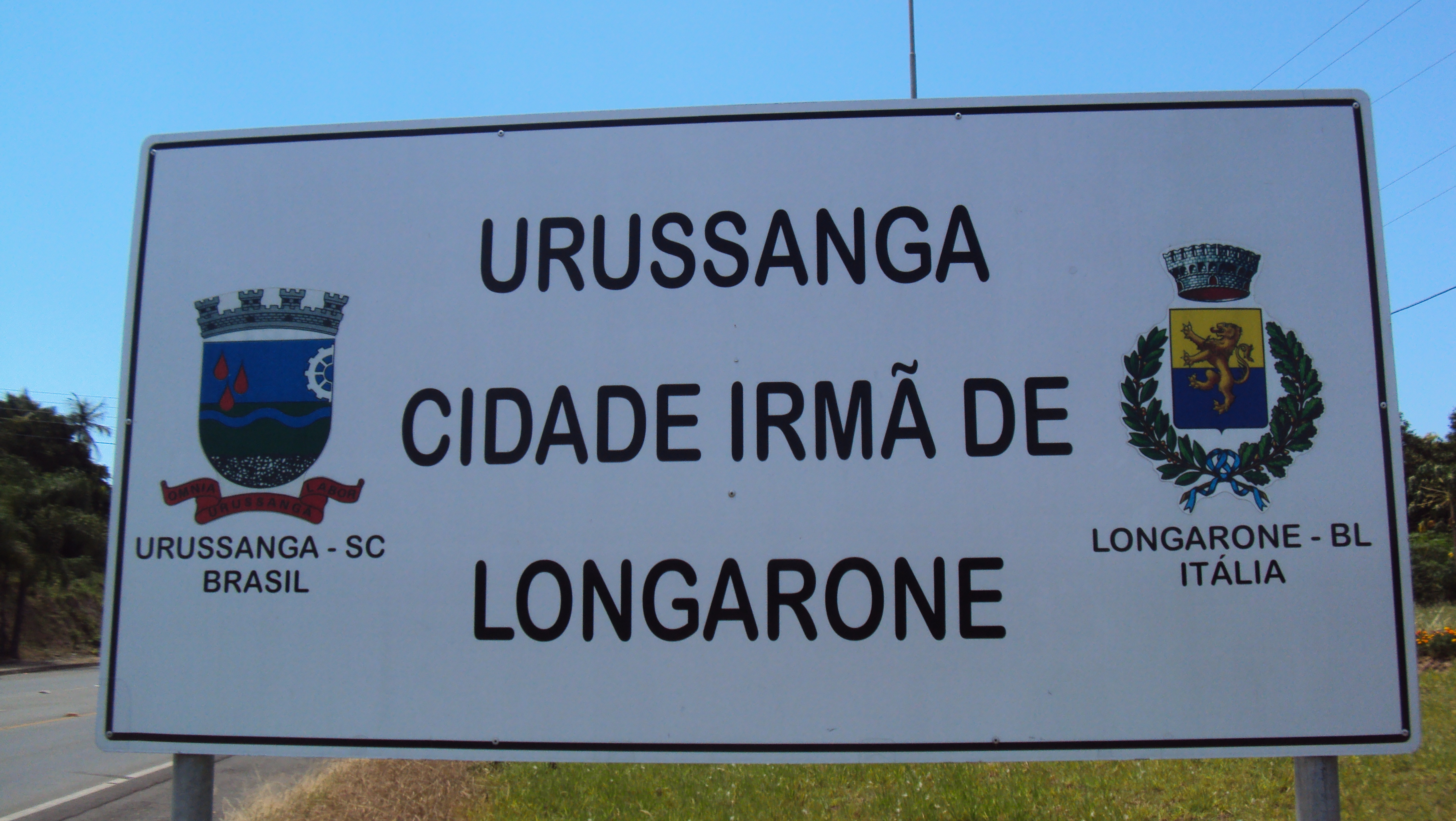 Urussanga e Langarone são cidades irmãs